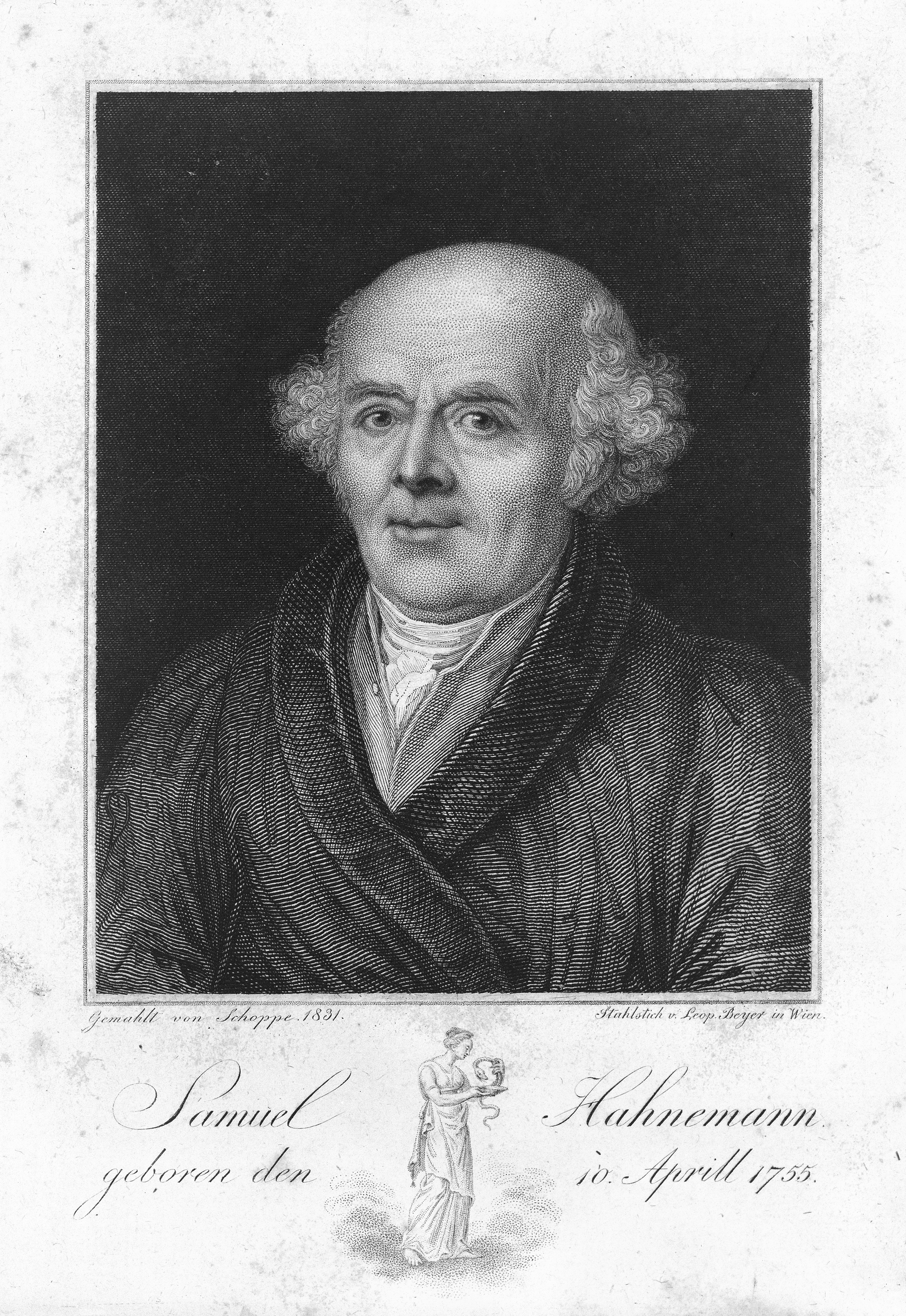 Samuel Christian Friedrich Hahnemann. Line engraving by L. Beyer after J. Schoppe, senior, 1831. Wellcome Images Keywords: Samuel Hahnemann; J. Schoppe; L. Beyer